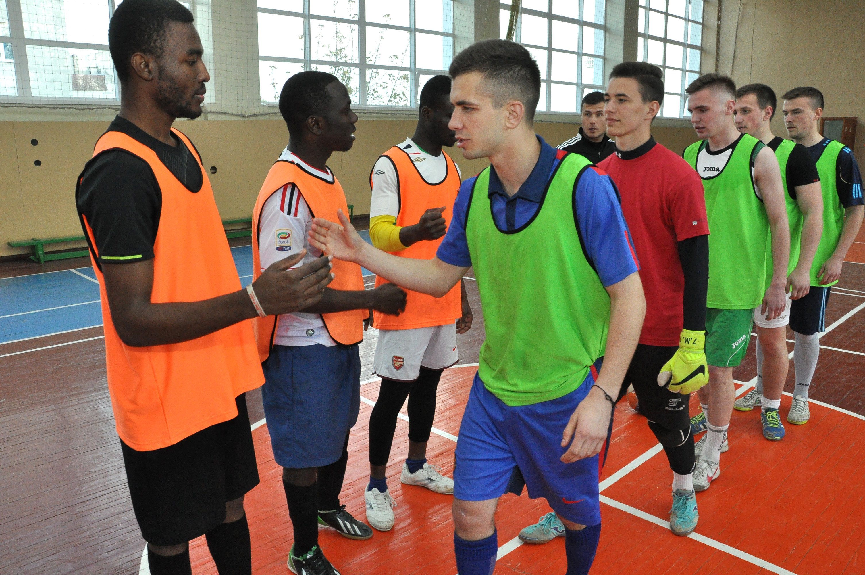 Міні-футбол «Ліга чемпіонів» Тернопільського державного медичного університету імені І. Я. Горбачевського. Півфінальні та фінальний поєдинки 26 квітня 2016 року.